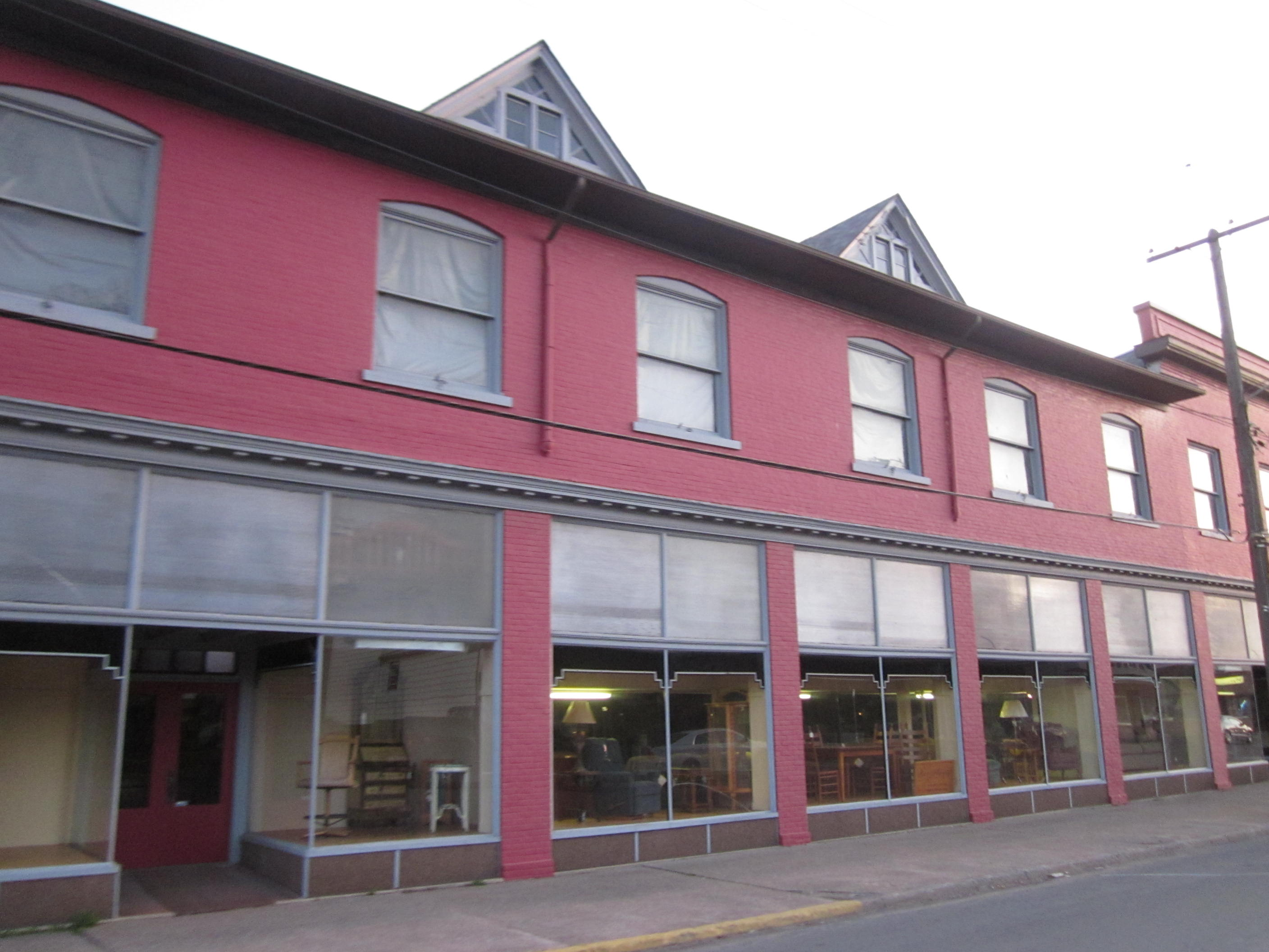 Houtzdale, Pennsylvania